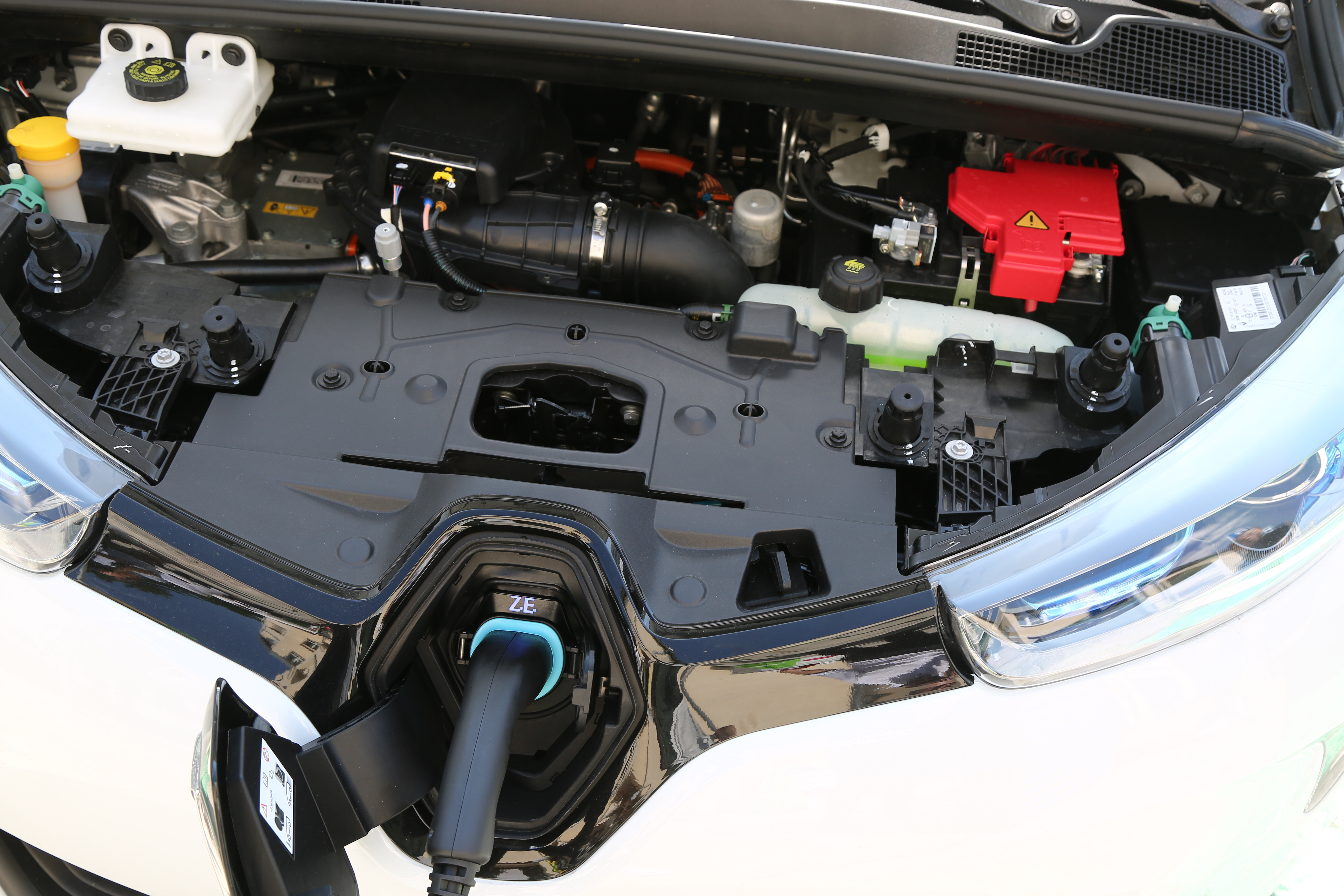 Renault Zoe